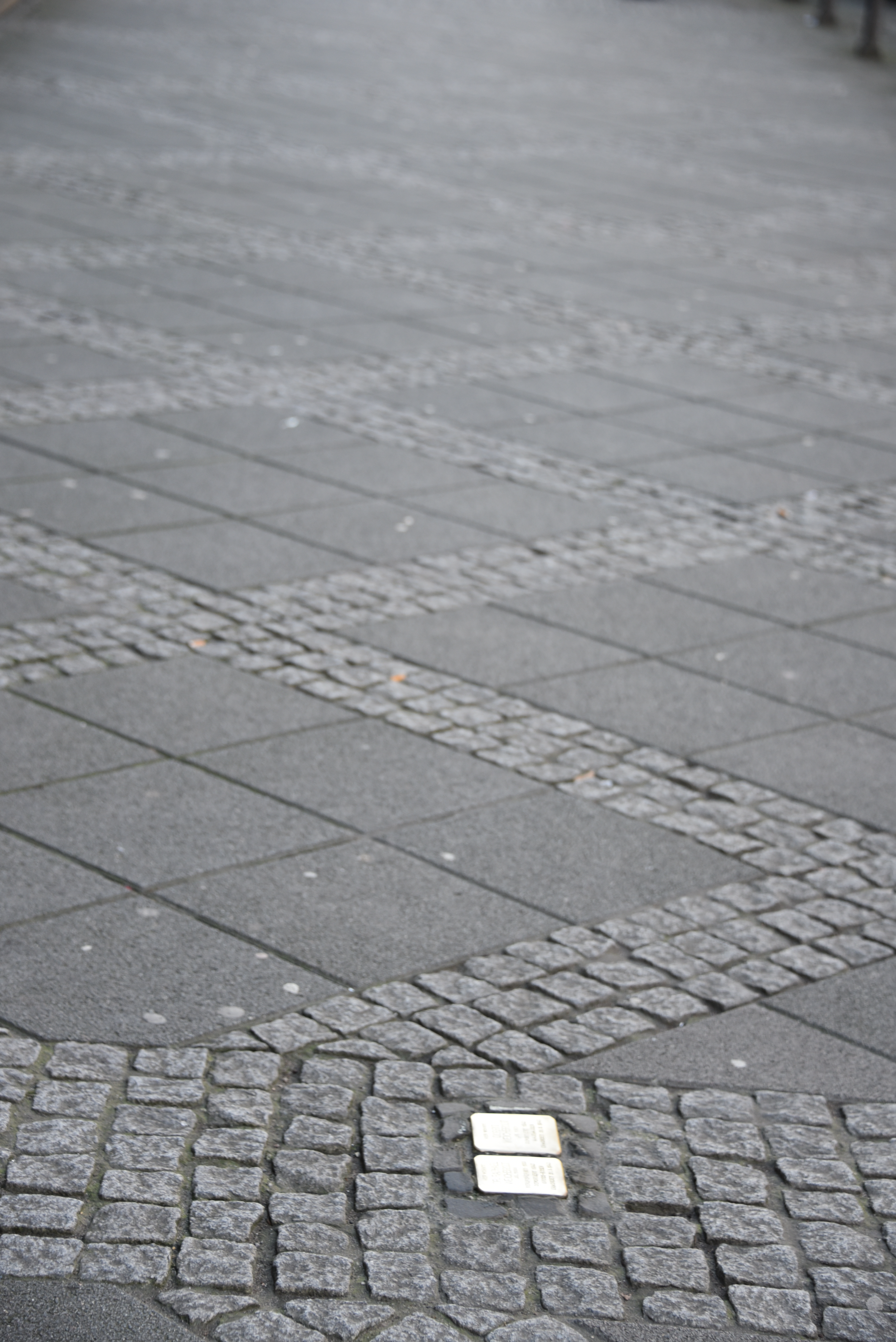 Stolpersteine in Frankfurt am Main